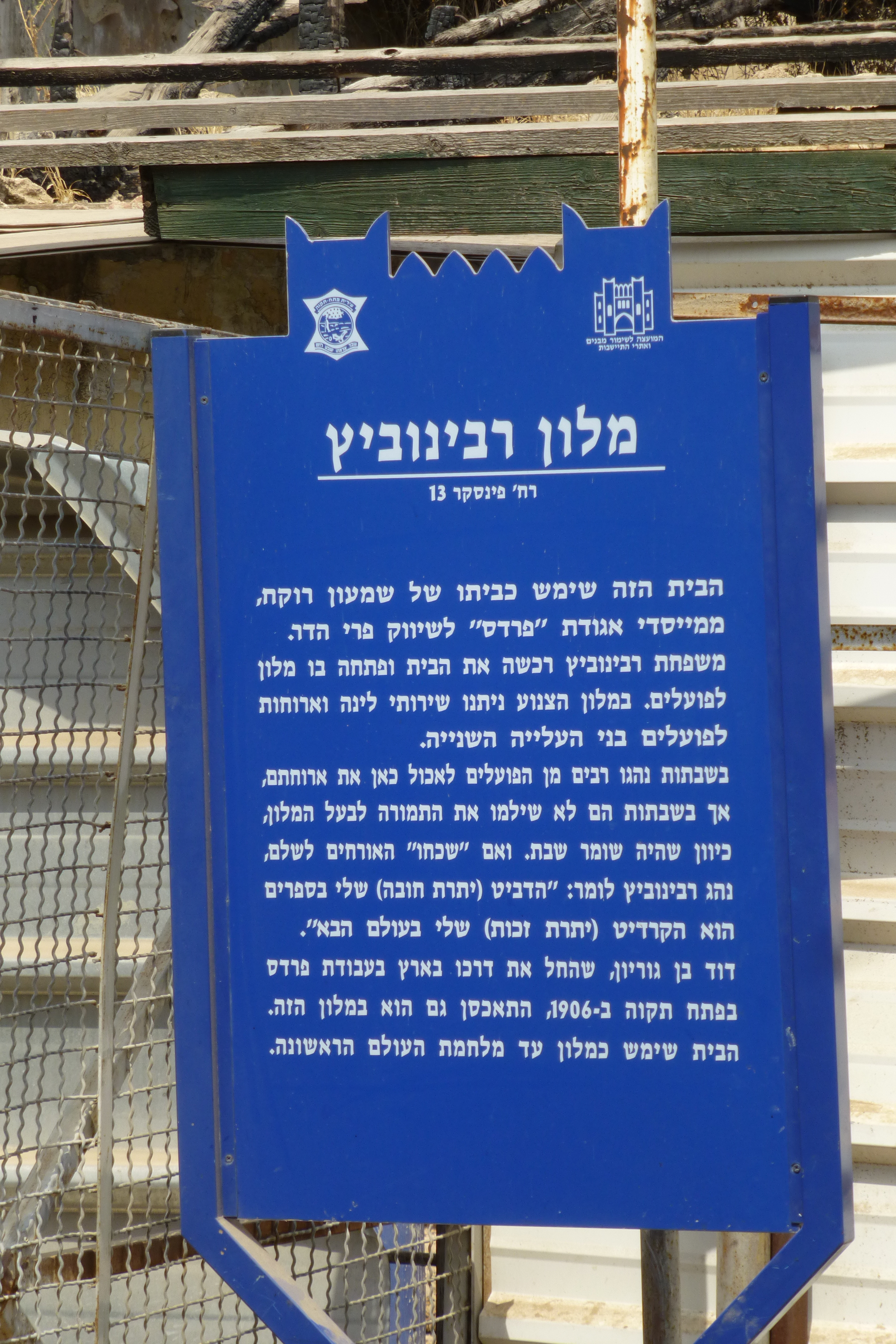 שימש כביתו של שמעון רוקח, משווק פרי הדר בעיר. הבית שימש כמלון עד מלחמת העולם הראשונה, ודוד בן-גוריון התאחסן במלון הזה כשהגיע לעבוד בפרדסים באזור, בשנת 1906.